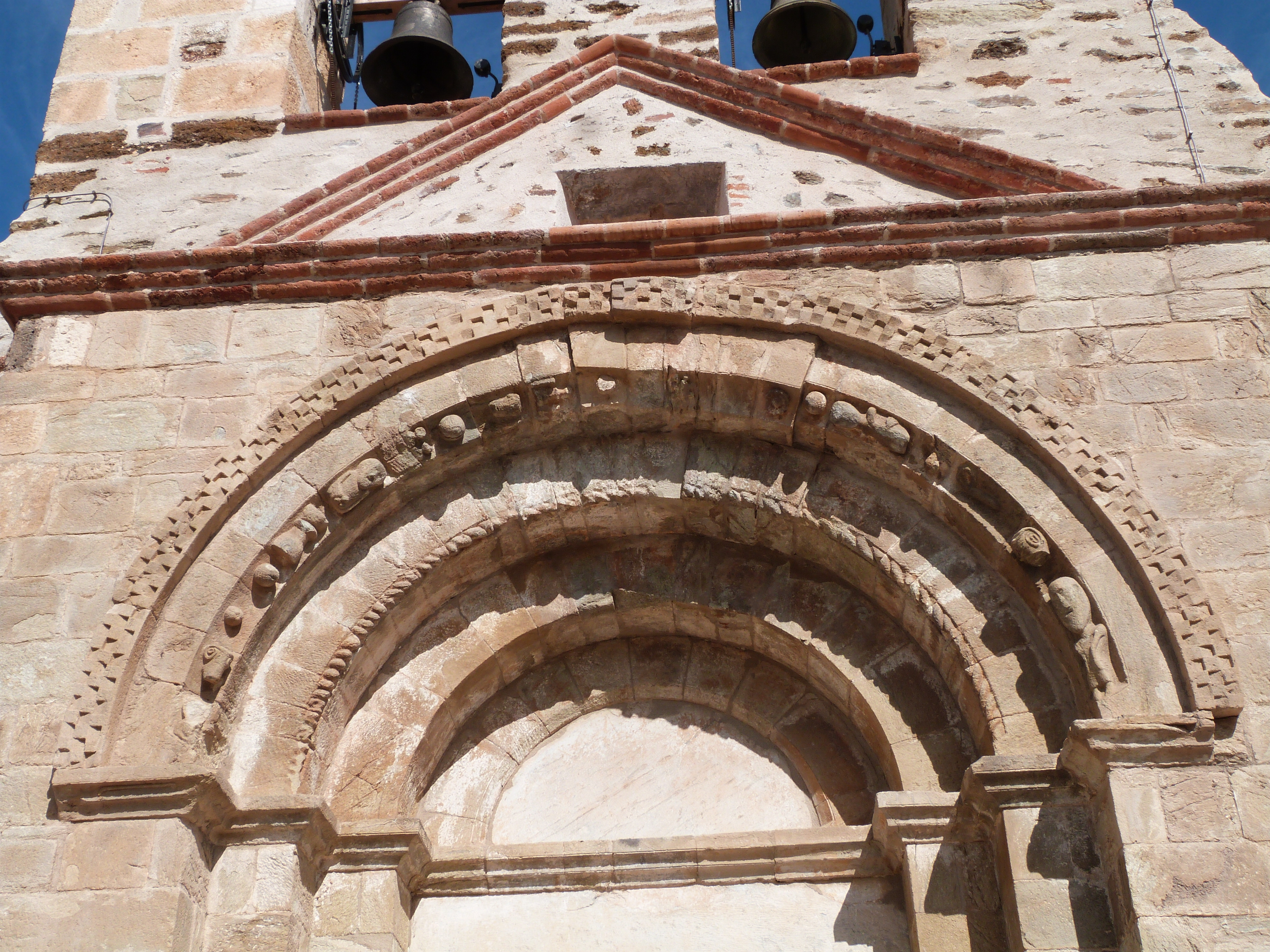 Église Saint-Jean de la Rectoria